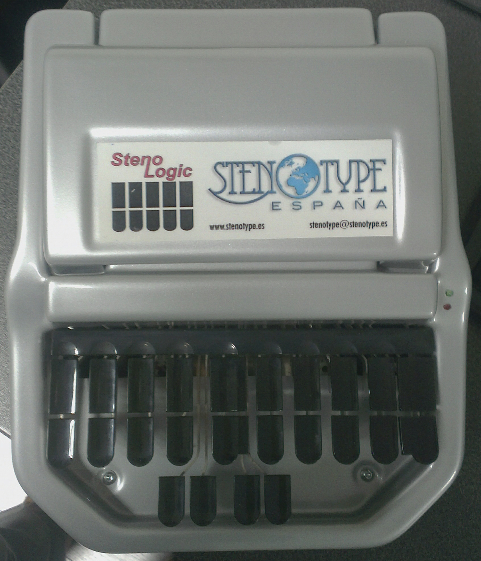 Máquina de estenotipia informatizada conexión por usb perteneciente a la empresa Stenotype España